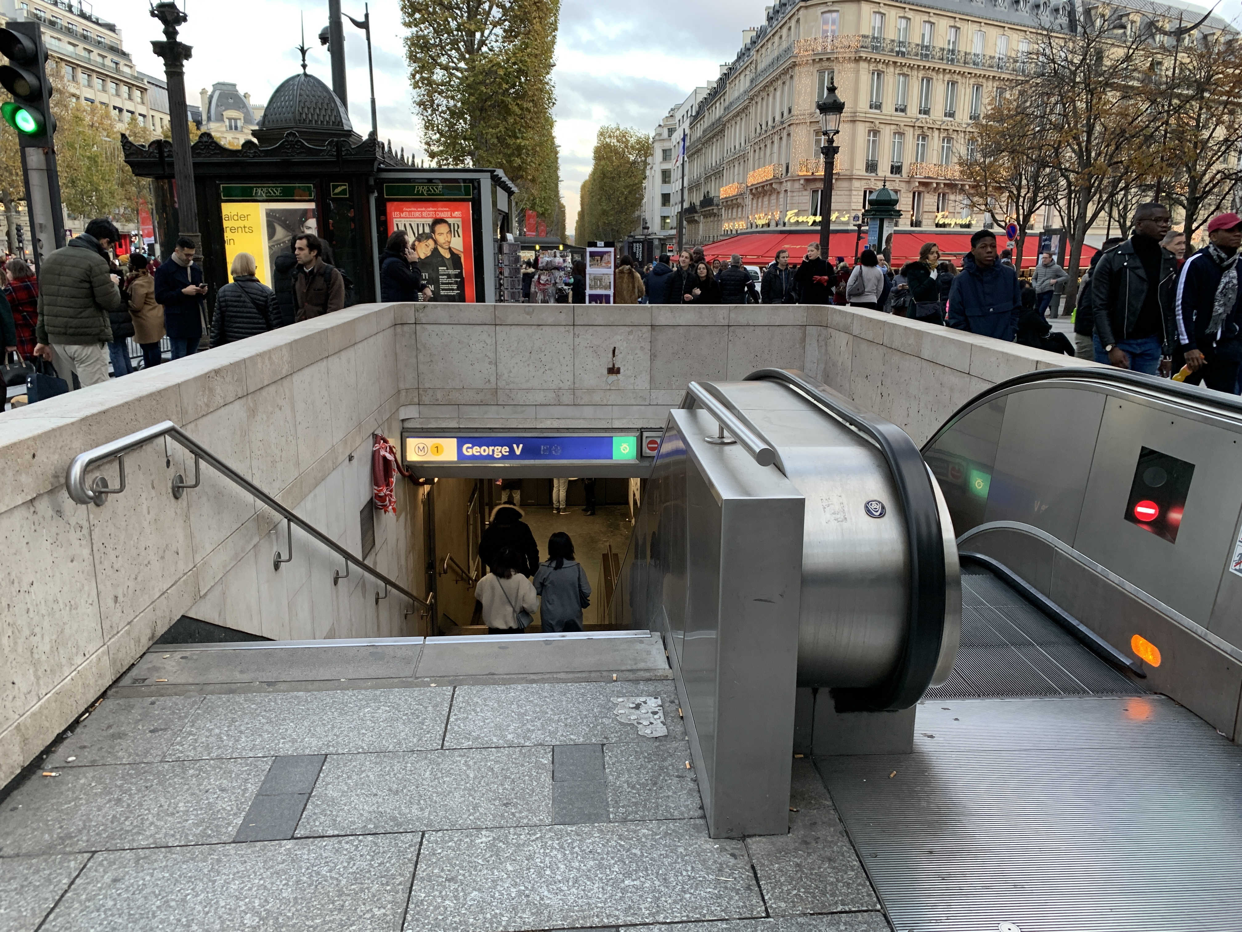 Entrée de la station de métro George V, Paris.